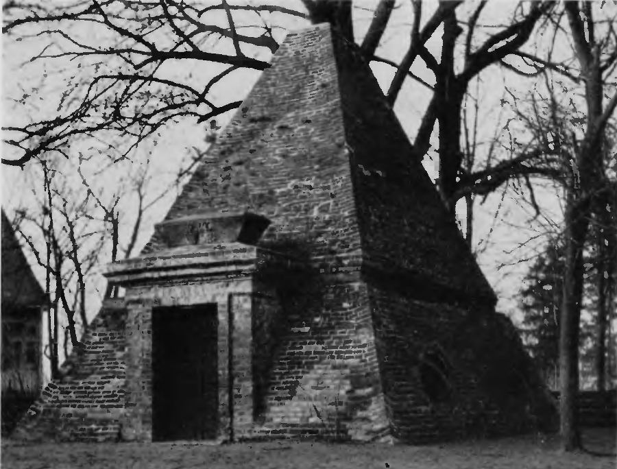 Rożnów - grobowiec „piramida” rodzin Eben i Mohring, obok kościoła filialnego, 1780 (zabytek nr A-25/2003 z 12.10.2003)